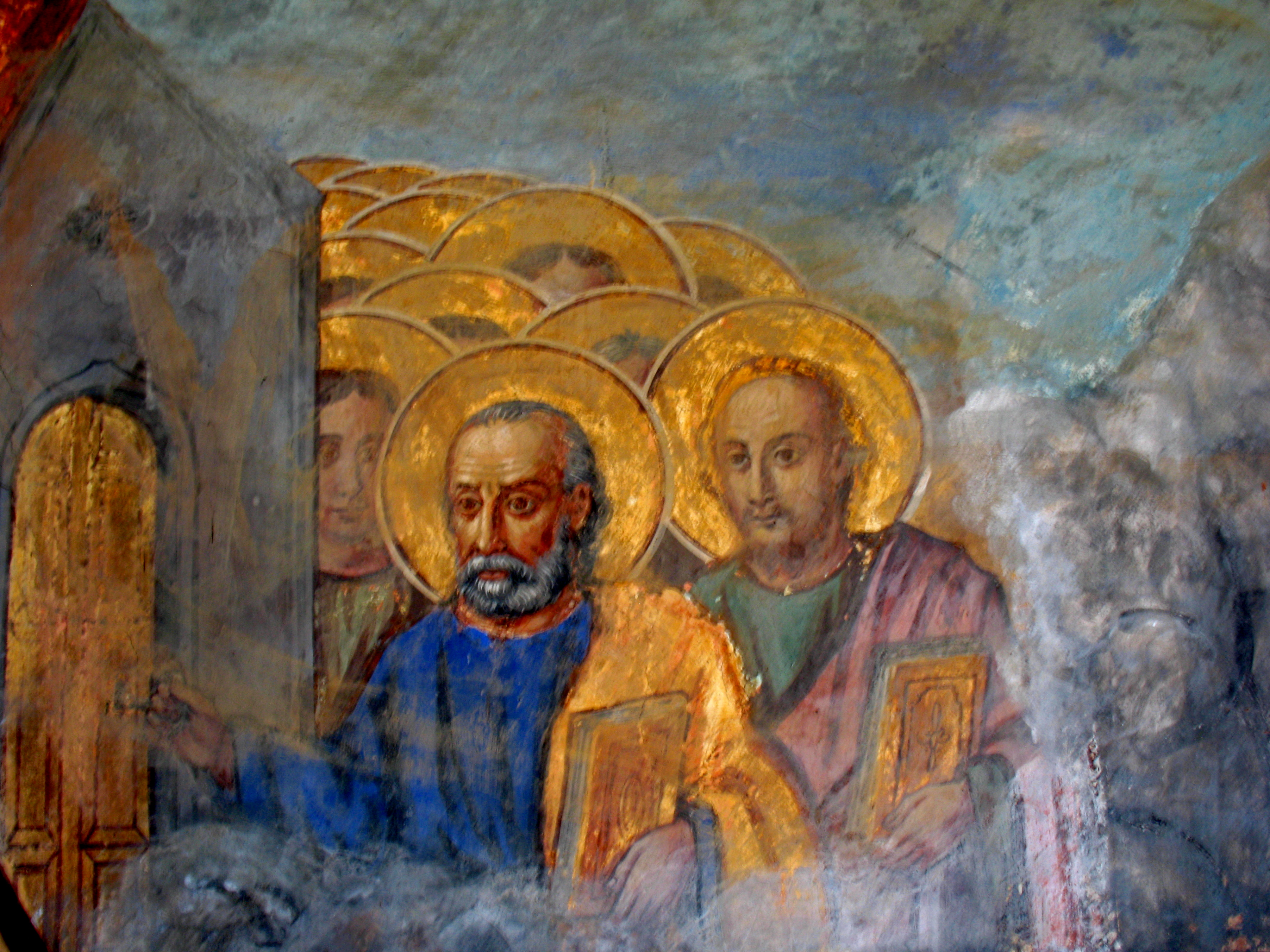 „Стенопис (детайл), Храм СВ. ВМЧ. „Неделя“, Райково, Смолян“